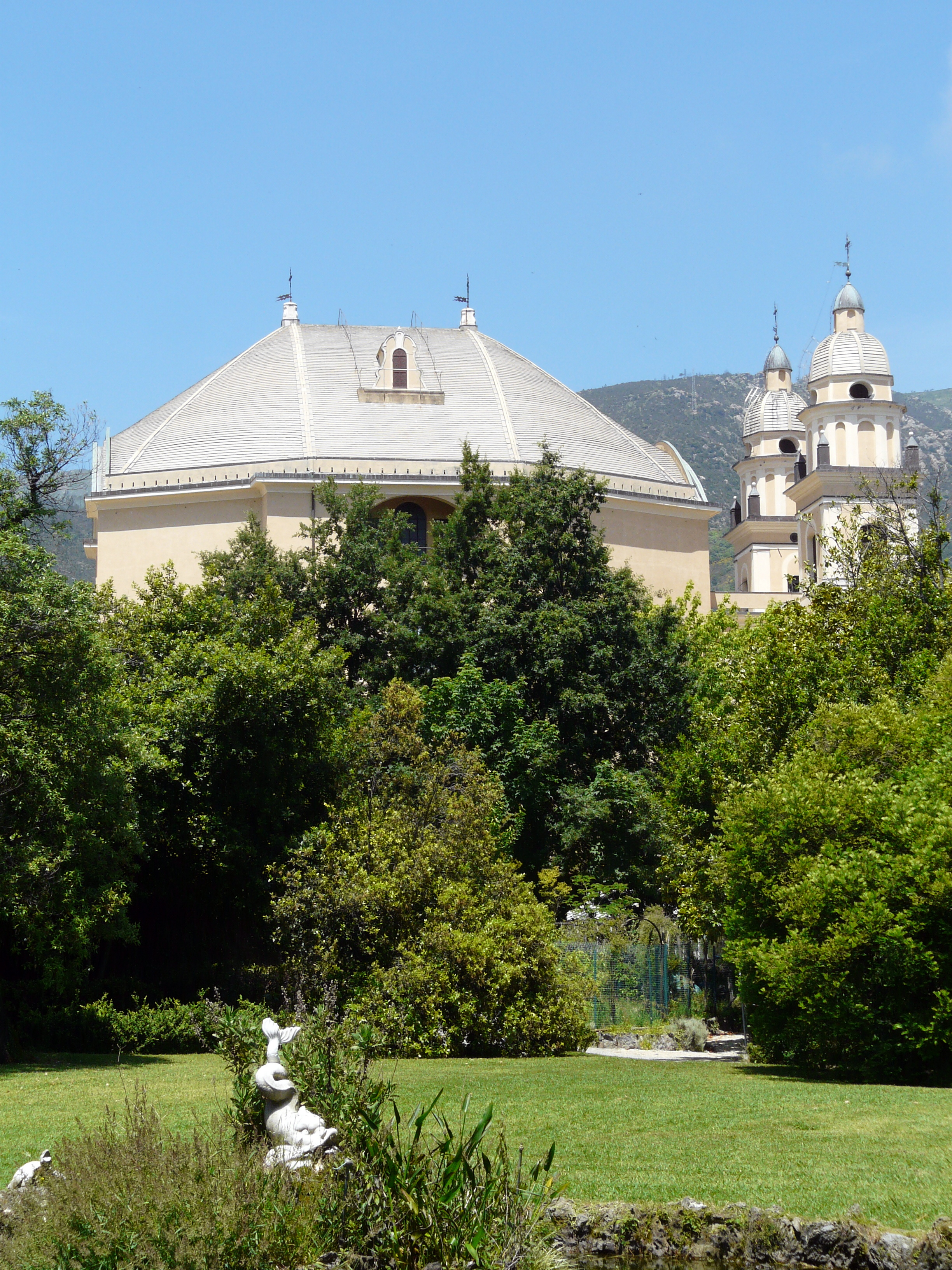 Complesso della chiesa dei Santi Nazario e Celso dal parco di Villa Negrotto Cambiaso, Arenzano, Liguria, Italia